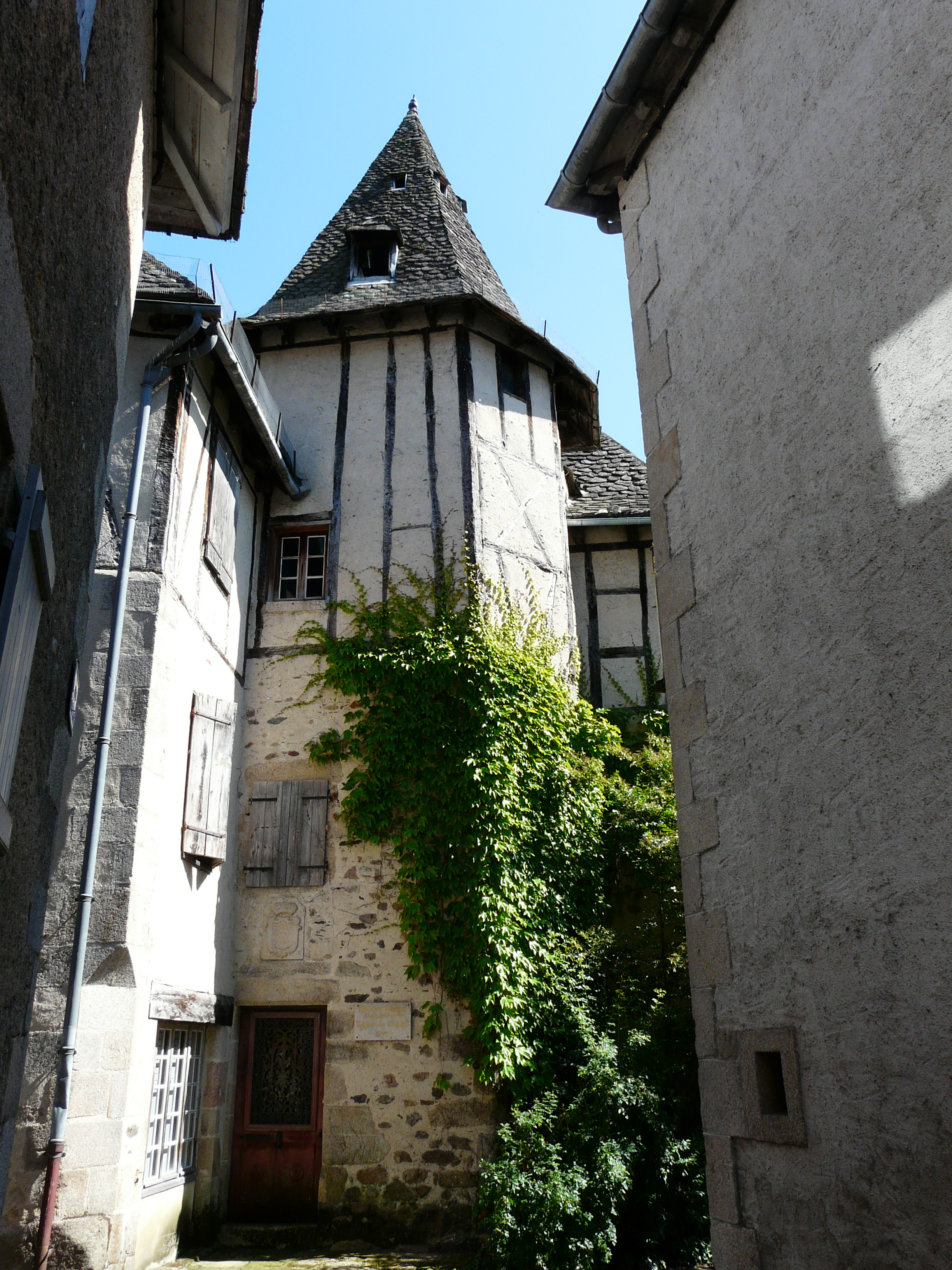 La tour du manoir de l'Eyrial, Argentat, Corrèze, France.